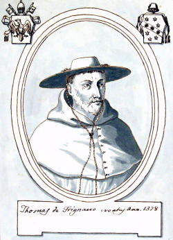 Cardinale Tommaso da Frignano, bispo di Frascati